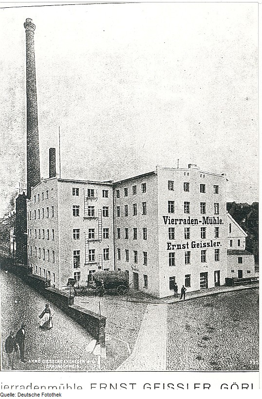 Original image description from the Deutsche Fotothek Görlitz. Vierradenmühle, aus: Die Mühle vom 16.10.1908